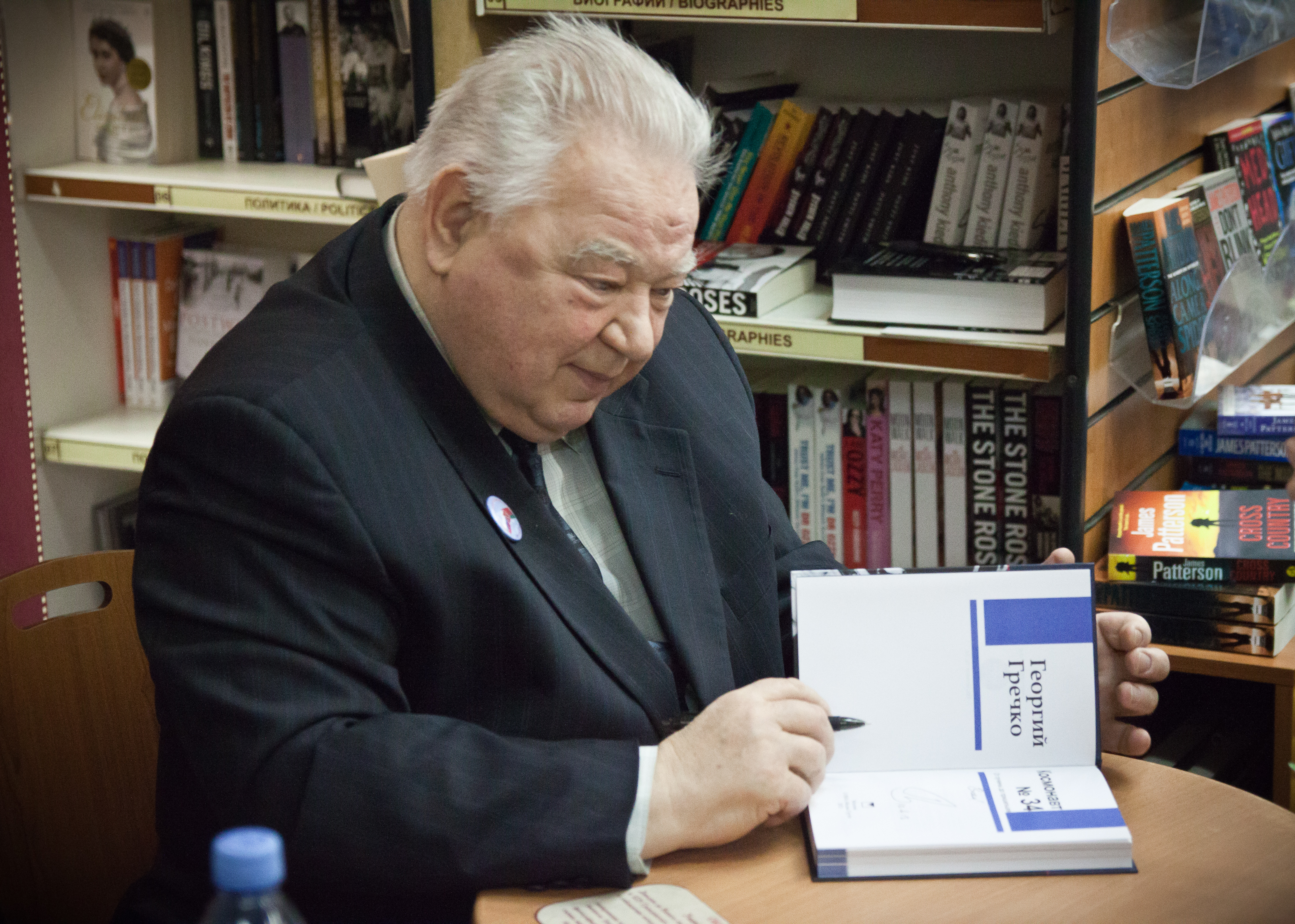 Георгий Гречко на презентации книги "Космонавт №34. От лучины до пришельцев"